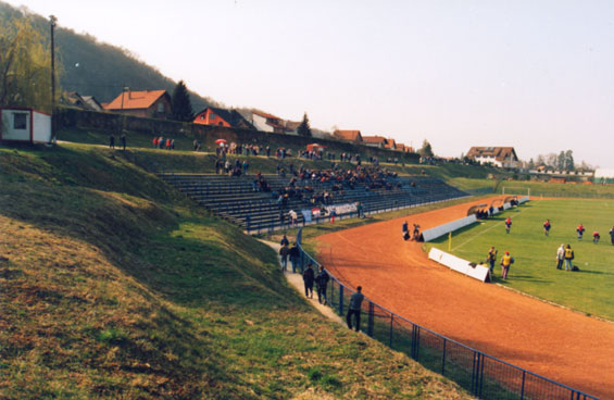 Photo du Stade Hebrangova à Samobor. Libre de droit